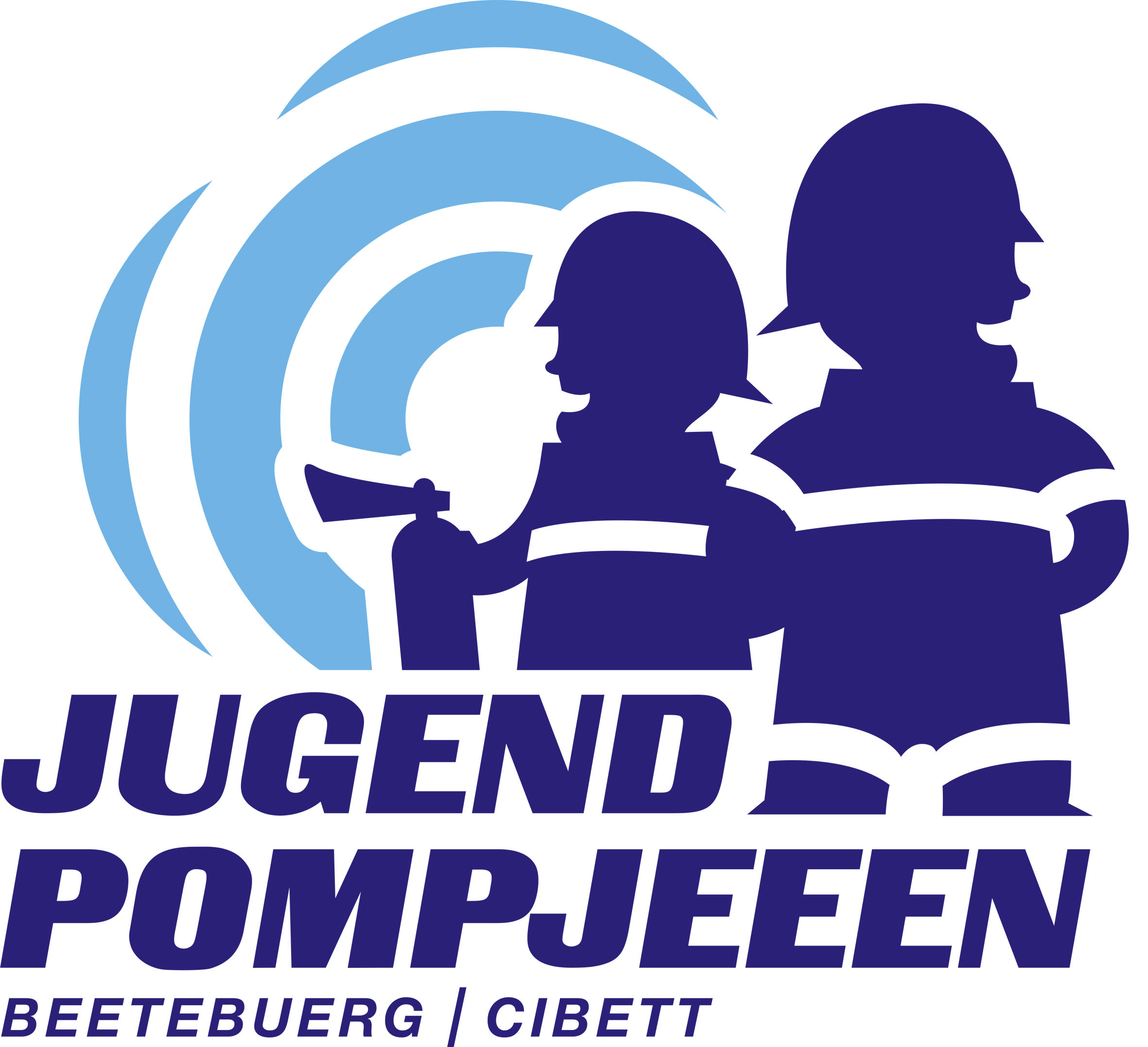 Den Logo vun den Jugendpompjeeën